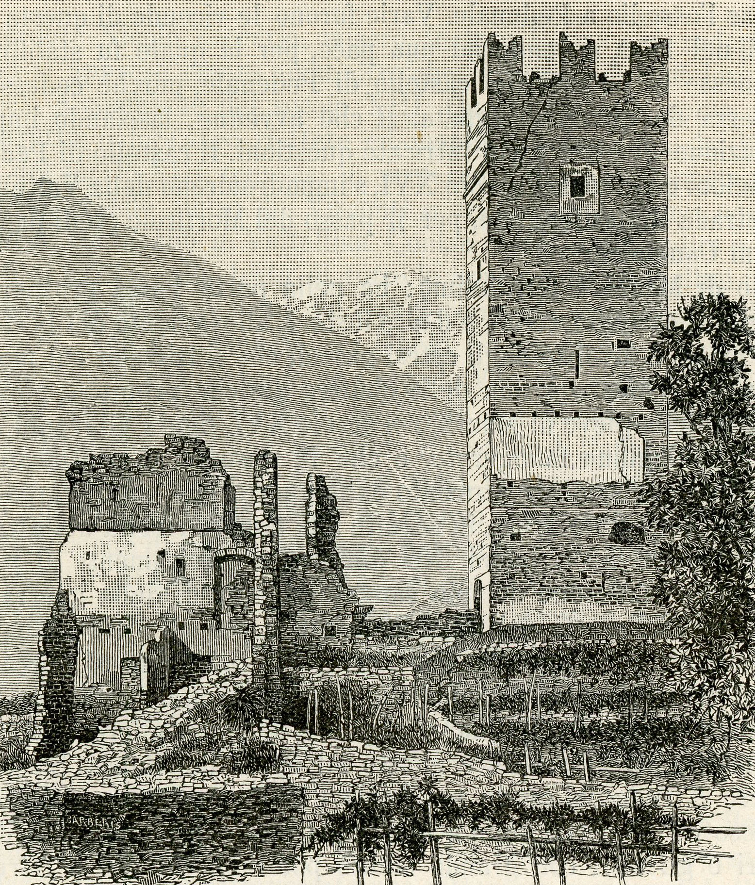 Mazzo di Valtellina: avanzi del castello di Pedenale (xilografia di Giuseppe Barberis).